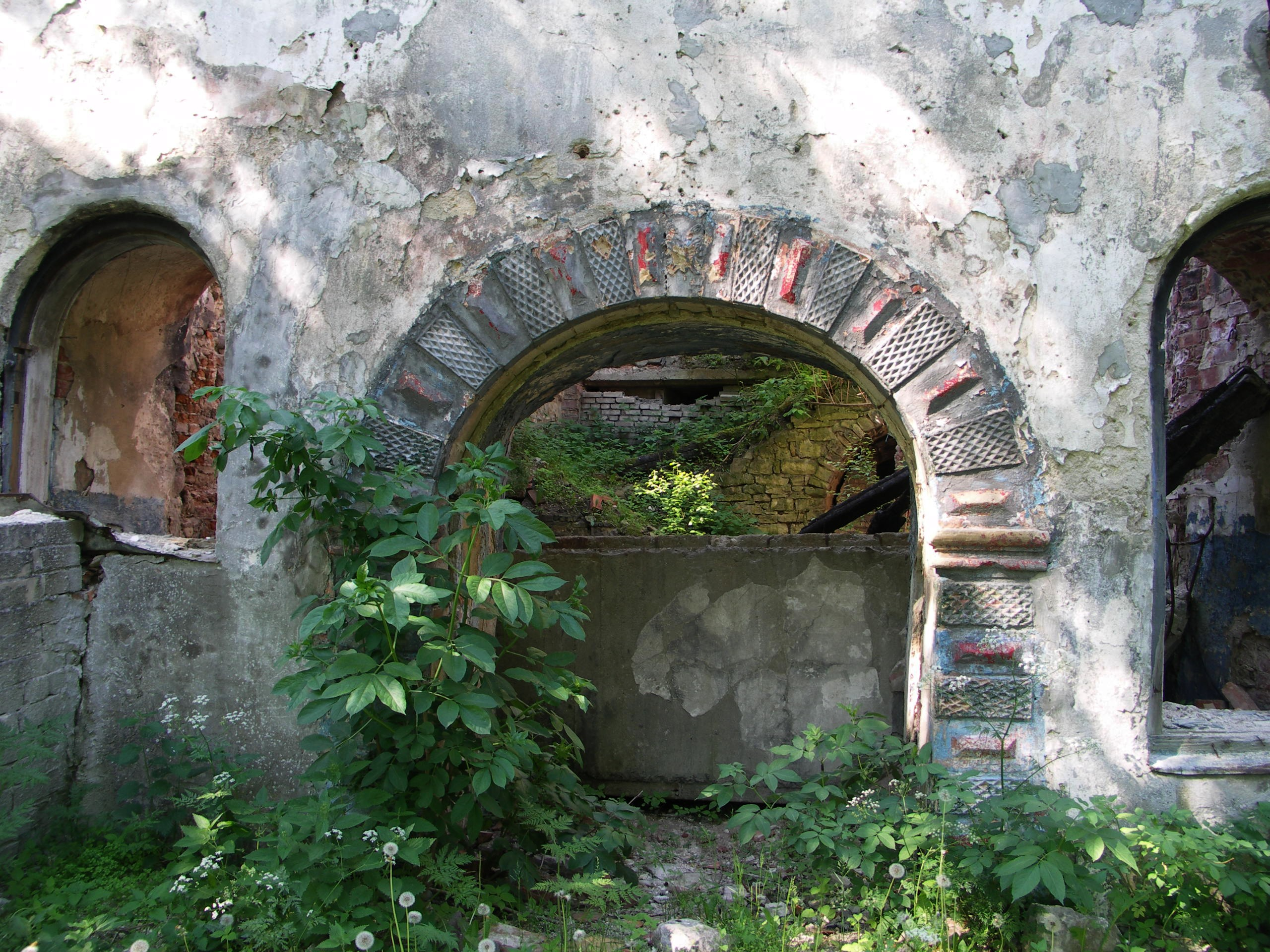 Kiltsi mõisa peaportaal